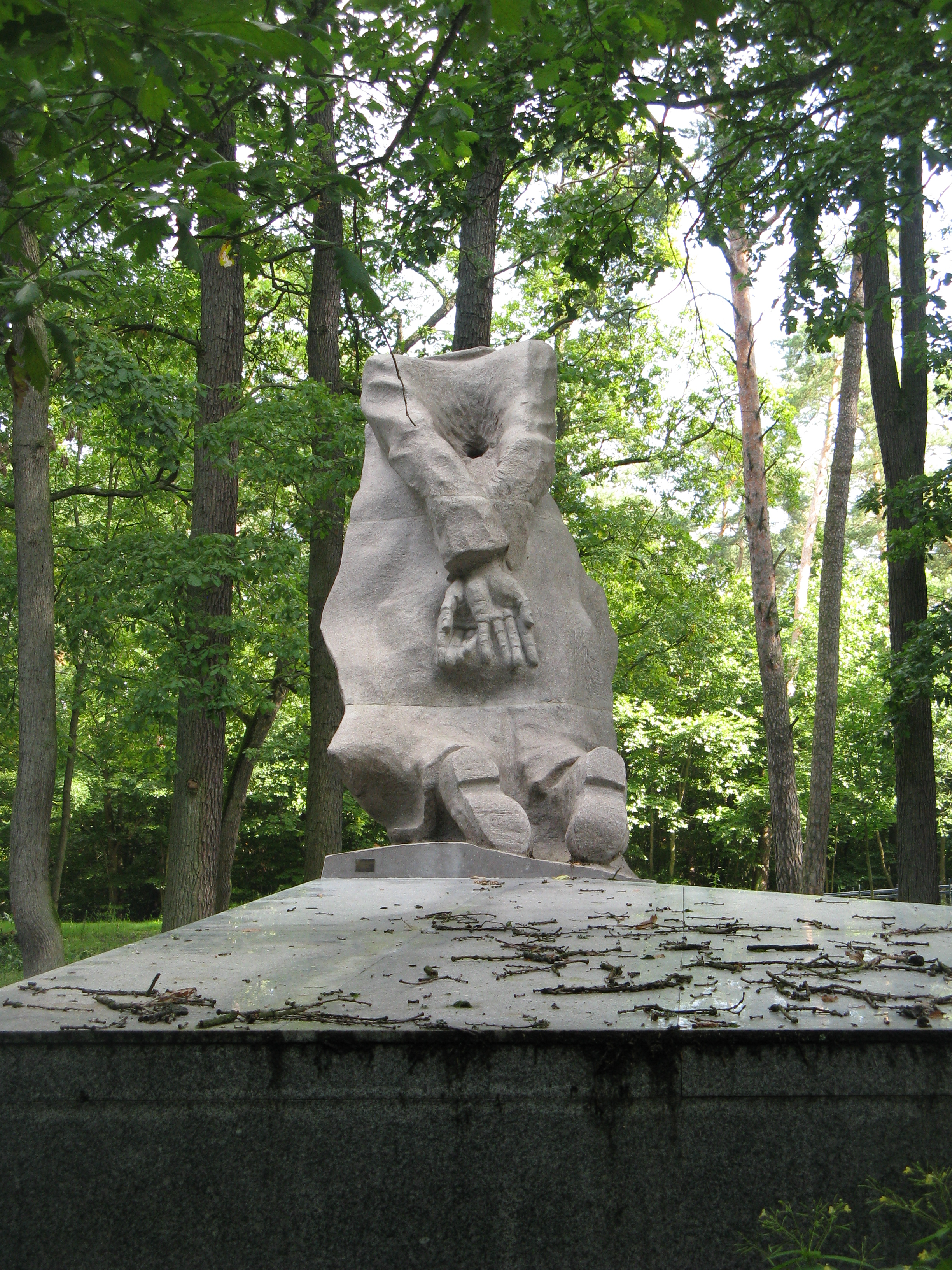 Pomnik Ku Czci Pomordowanych na Barbarce w Toruniu odsłonięty 28 października 2009